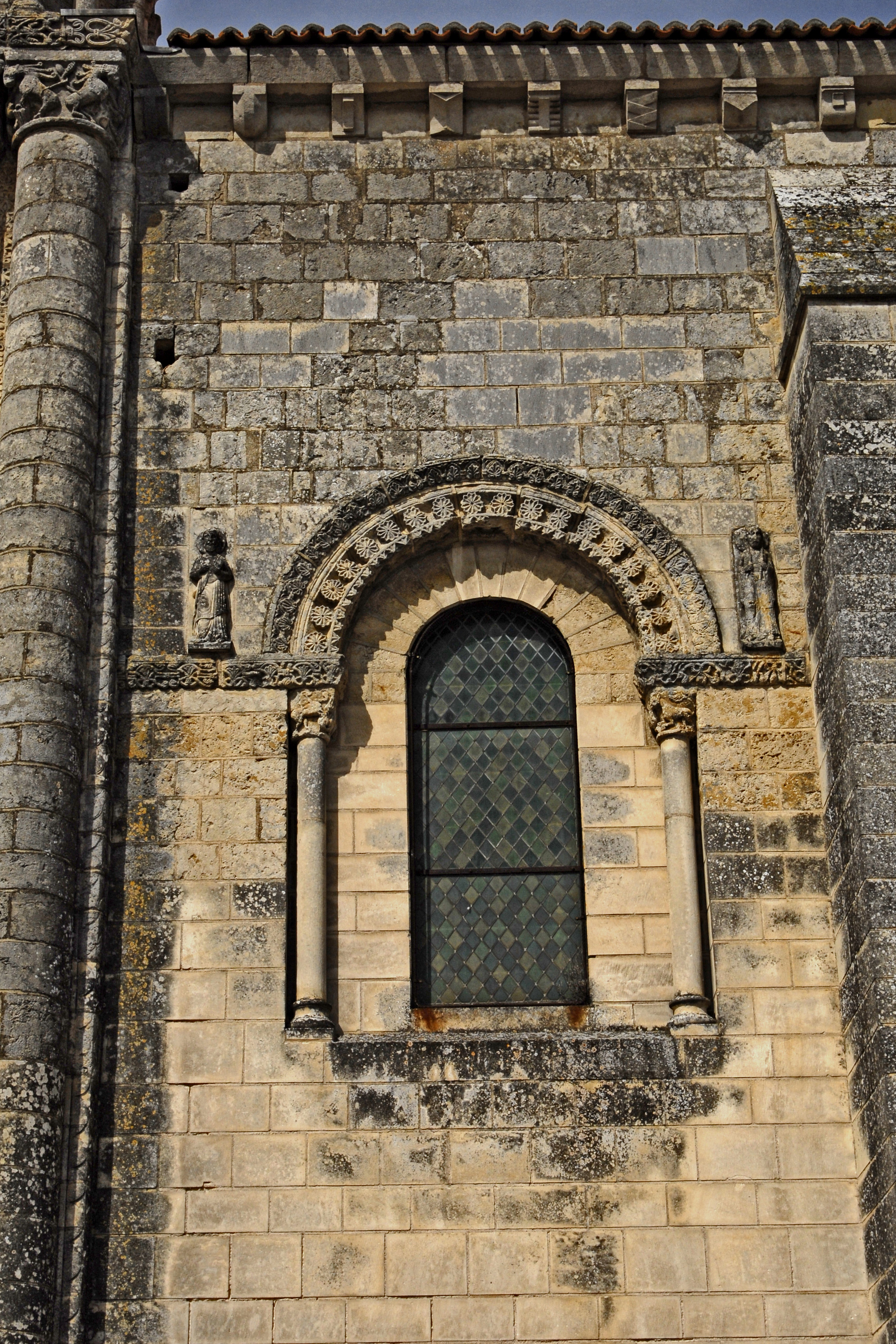 Saint-Jouin-de-Marnes, Langhausfenster Südwand, erstes Joch